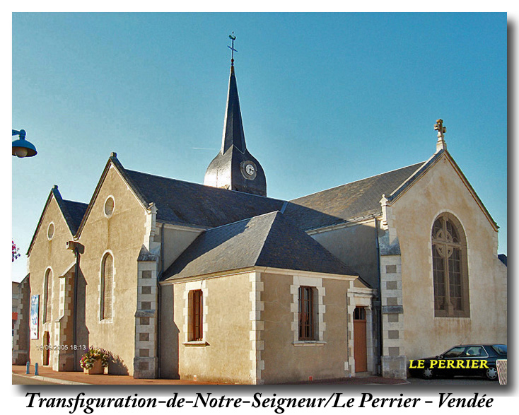 partie sud-est